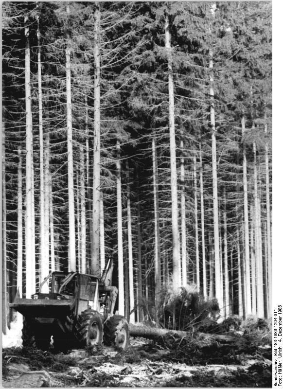 Valtenberg, Holzrücken ADN-ZB Häßler 4.12.1986 pe Bez. Dresden: Wettbewerbsaufruf - Im Wald der Oberförsterei Valtenberg, die zum Staatlichen Forstwirtschaftsbetrieb Löbau gehört, werden geschlagene Bäume mit dem Rückefahrzeug zum Sammelplatz transportiert. Im kommenden Jahr wird sich die Lieferung von Rohholz aus diesem Betrieb um 5 800 Kubikmeter gegenüber 1986 erhöhen. Täglich sollen dann 403 Kubikmeter Rohholz termin- und sortimentgerecht an die Verladeplätze geliefert werden. Das beschlossen die Vertrauensleute der 770 Werktätigen in ihrem Wettbewerbsprogramm für 1987. (siehe 12,13N)